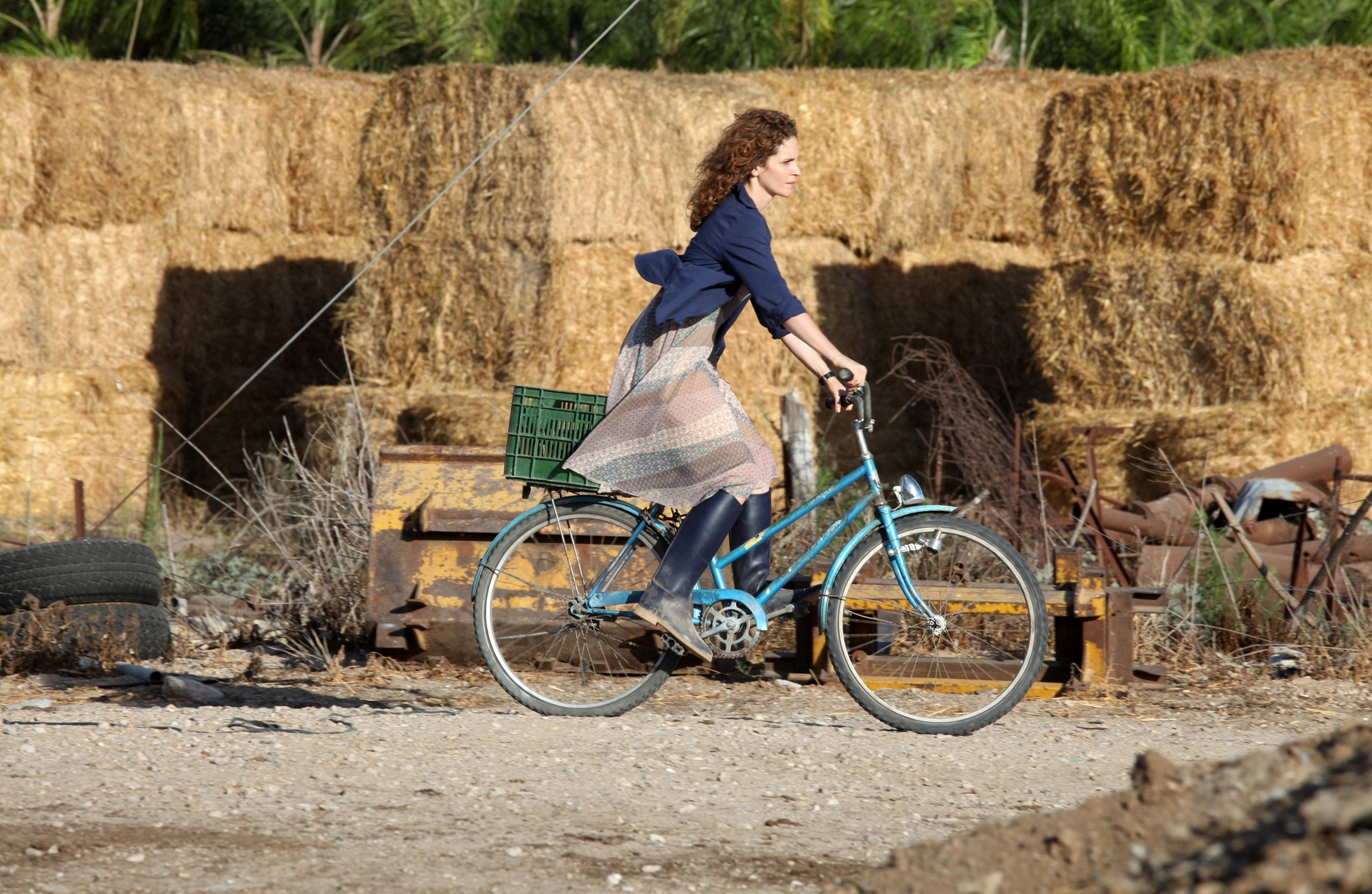 הגר בן-אשר בסרטה "הנותנת", 2011